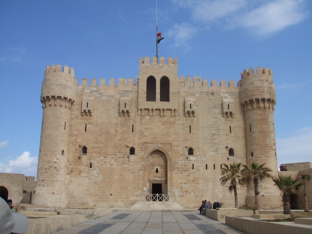 アレクサンドリアで撮影。要塞を正面から撮影した。